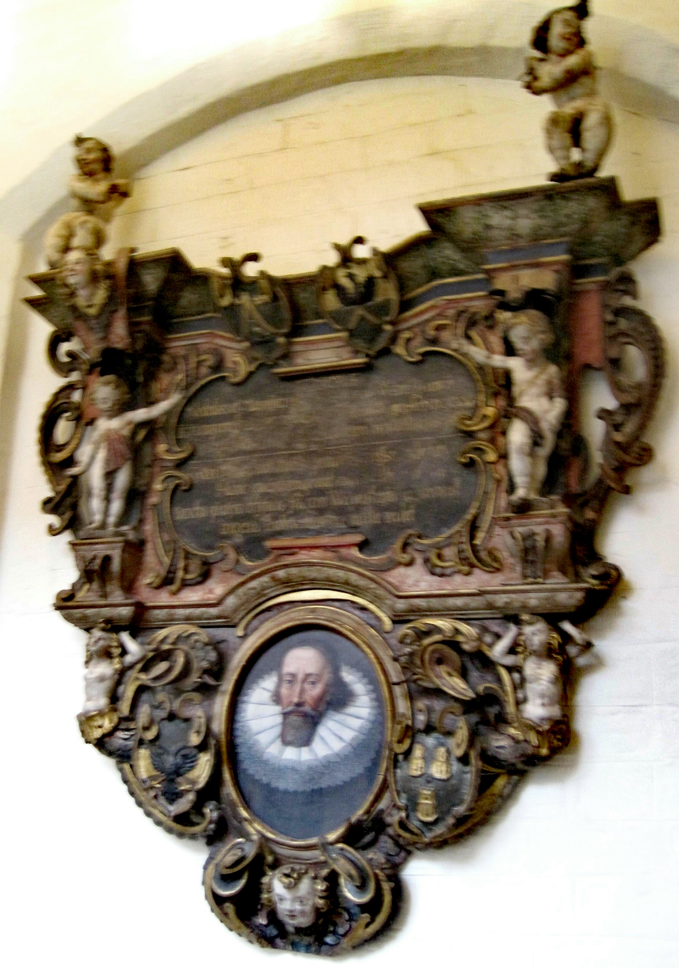 Epitaph des Lübecker Bürgermeister Heinrich Wedemhof (+ 1651) aus der Lübecker Marienkirche, nunmehr St Annen Museum Lübeck